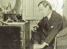 Fotografía del músico y poeta argentino Pascual Contursi